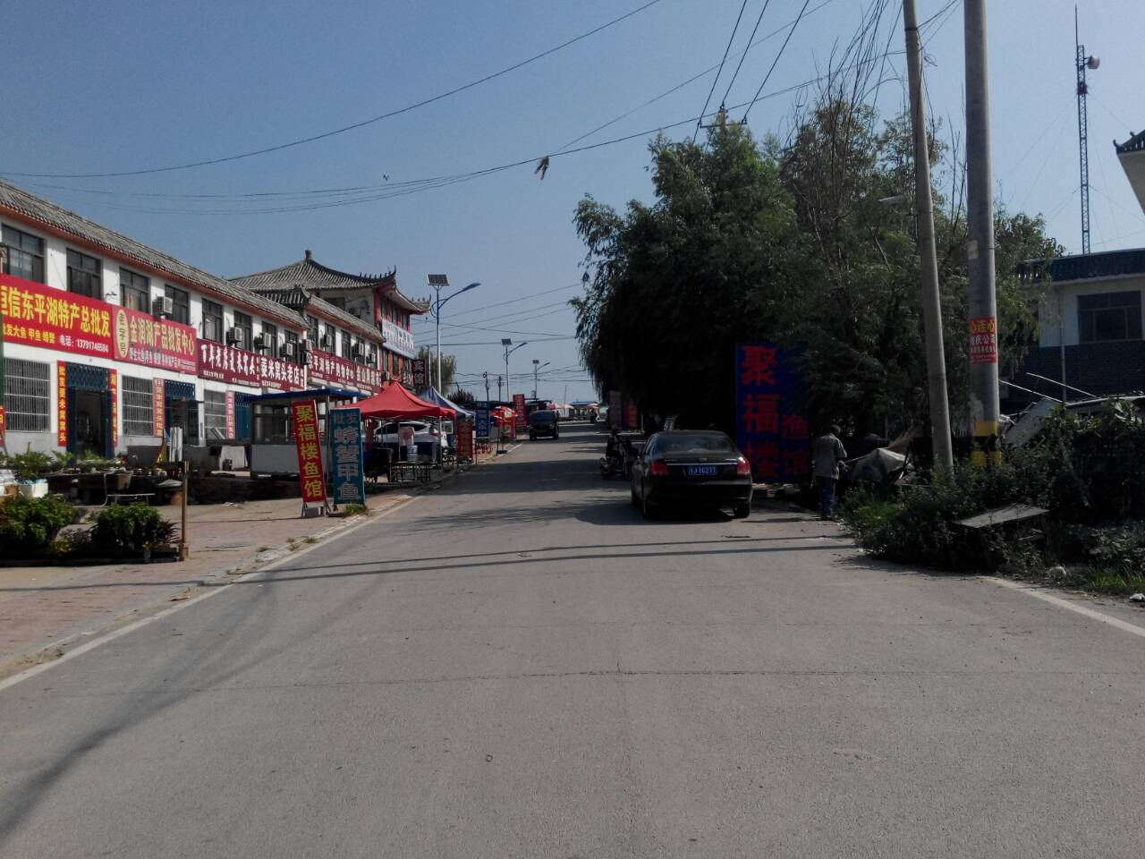 东平大安山